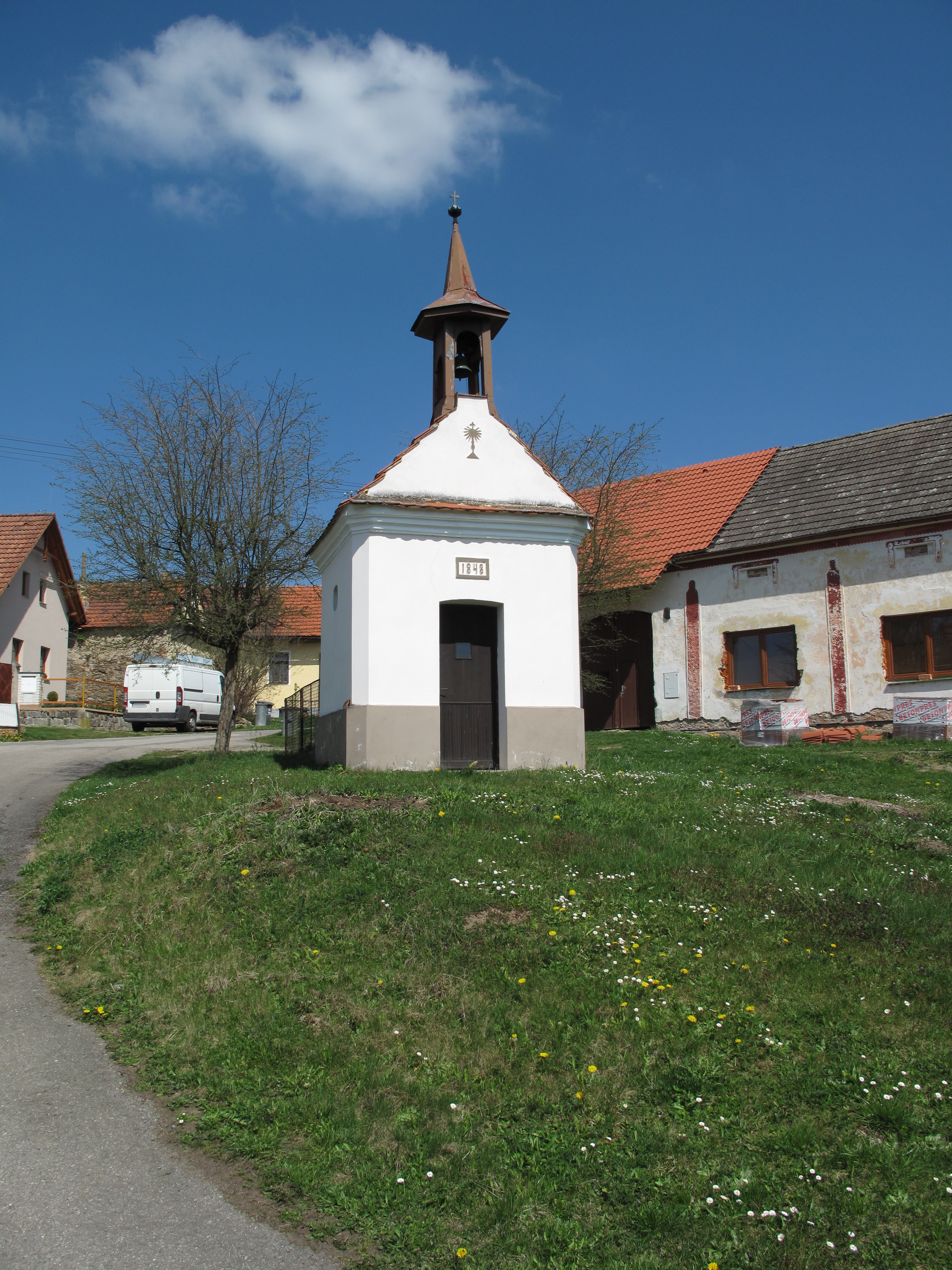 Kaplička ve Vlkově. Okres České Budějovice, Česká republika.